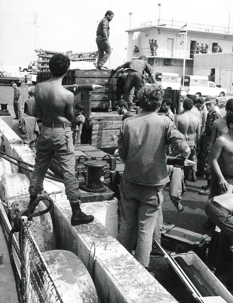 התארגנות להשלמת תחמושת לאחר אחד הקרבות ברציף בסיס חיפה